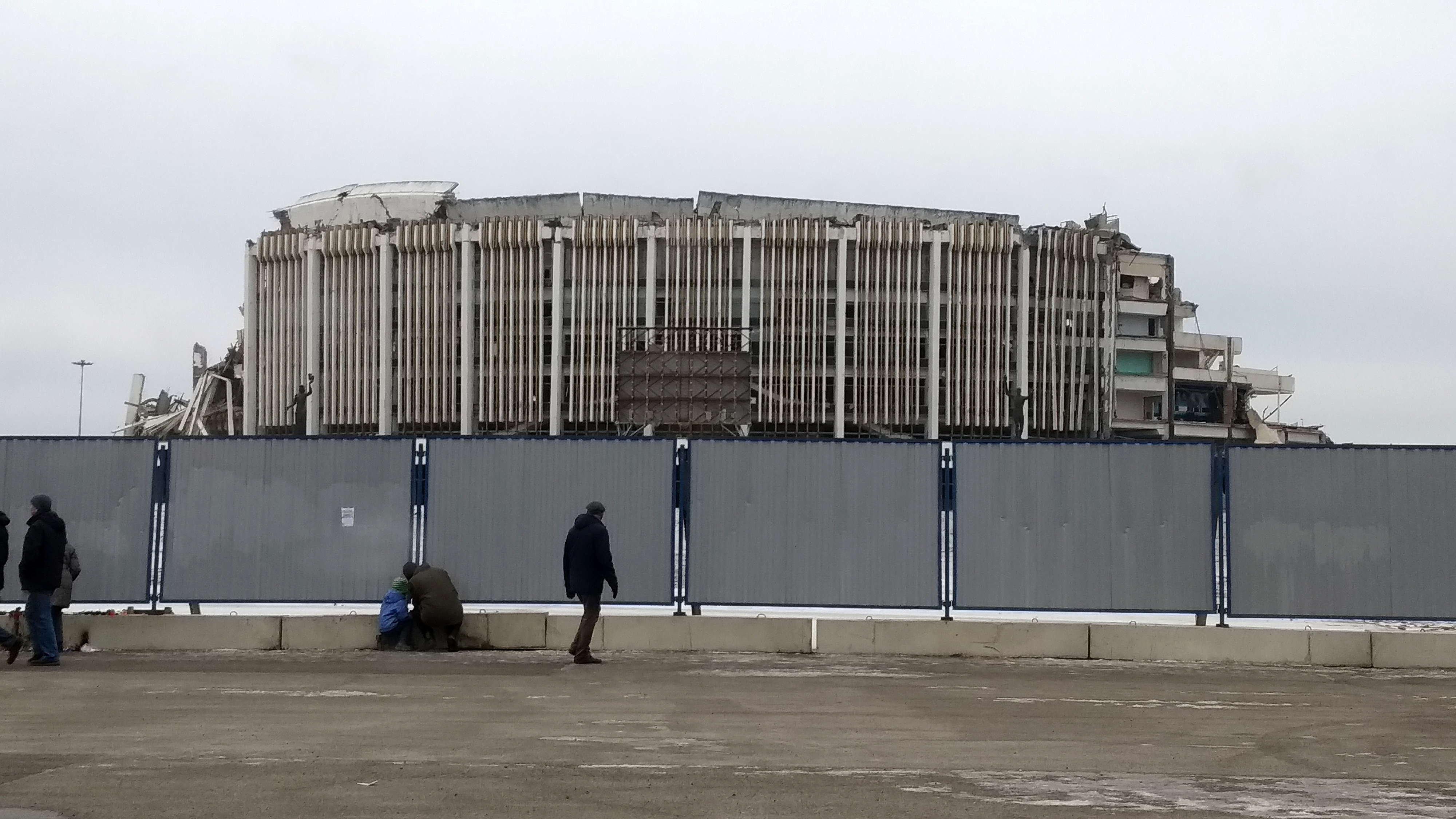 СКК после обрушения